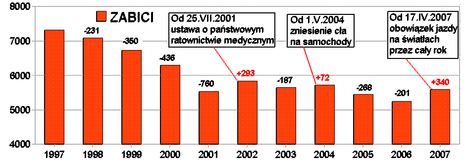 Zabici w wypadkach samochodowych w Polsce 1997-2007. Na ogólnym trendzie obserwowanego w dekadzie 1997-2007 spadku liczby zabitych w wypadkach samochodowych obserwuje się trzy wyjątki. W 2002 roku po wprowadzeniu ustawy o państwowym ratownictwie medycznym. Niewielkie zwiększenie liczby zabitych w wypadkach samochodowych wystąpiło w 2004 roku po zwolnieniu od cła importu samochodów z krajów WE. Najbardziej wzrosła liczba zabitych w wypadkach samochodowych po wprowadzeniu od kwietnia 2007 roku nakazu całodziennego używania świateł samochodowych podczas jazdy.